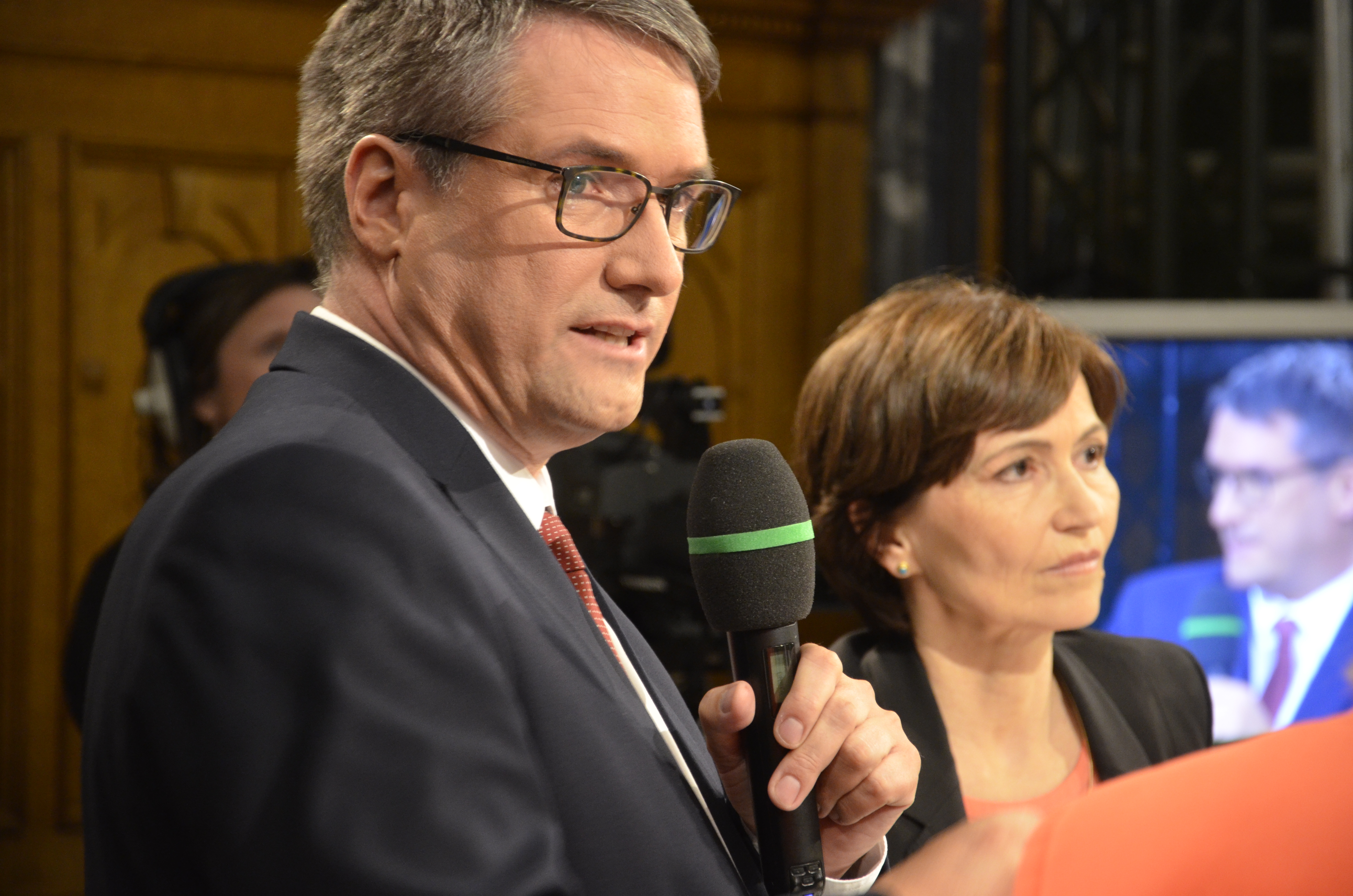 Schweizer Parlamentswahlen 2019: Christian Levrat und Regula Rytz im Bundeshaus